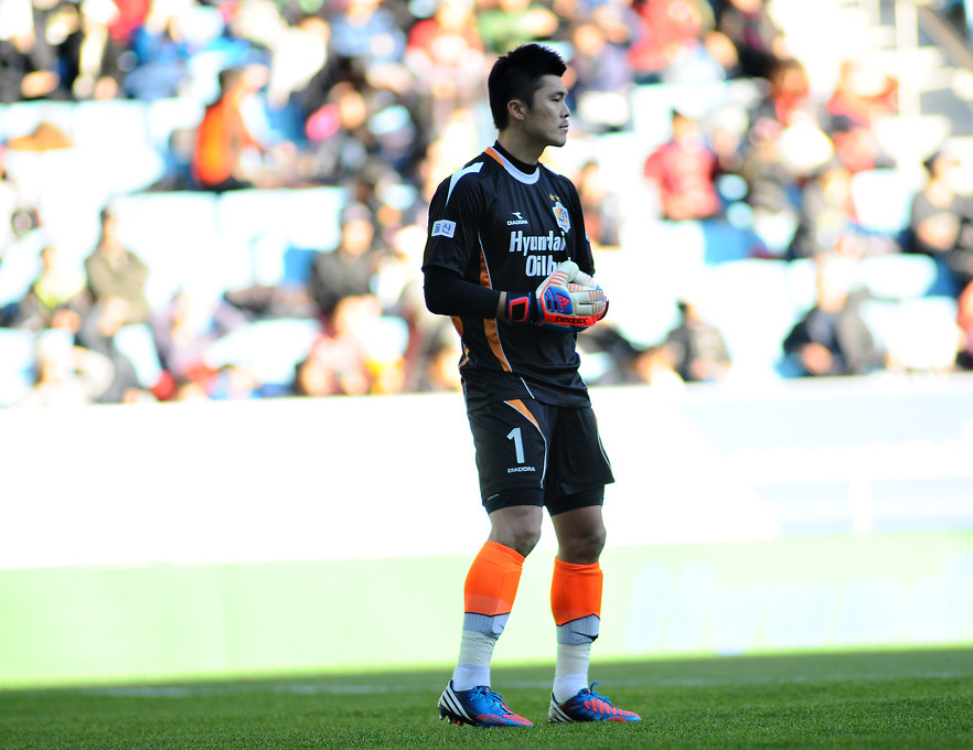 울산 현대 김영광